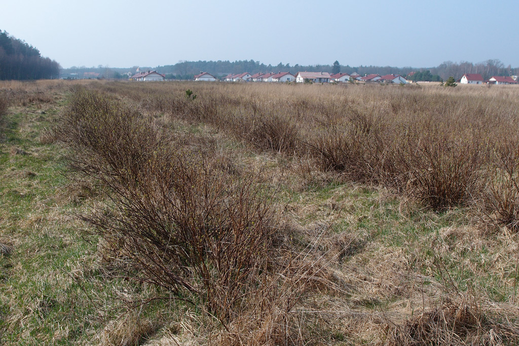 Wieś Sucha (Lubuskie) od strony nowego osiedla.